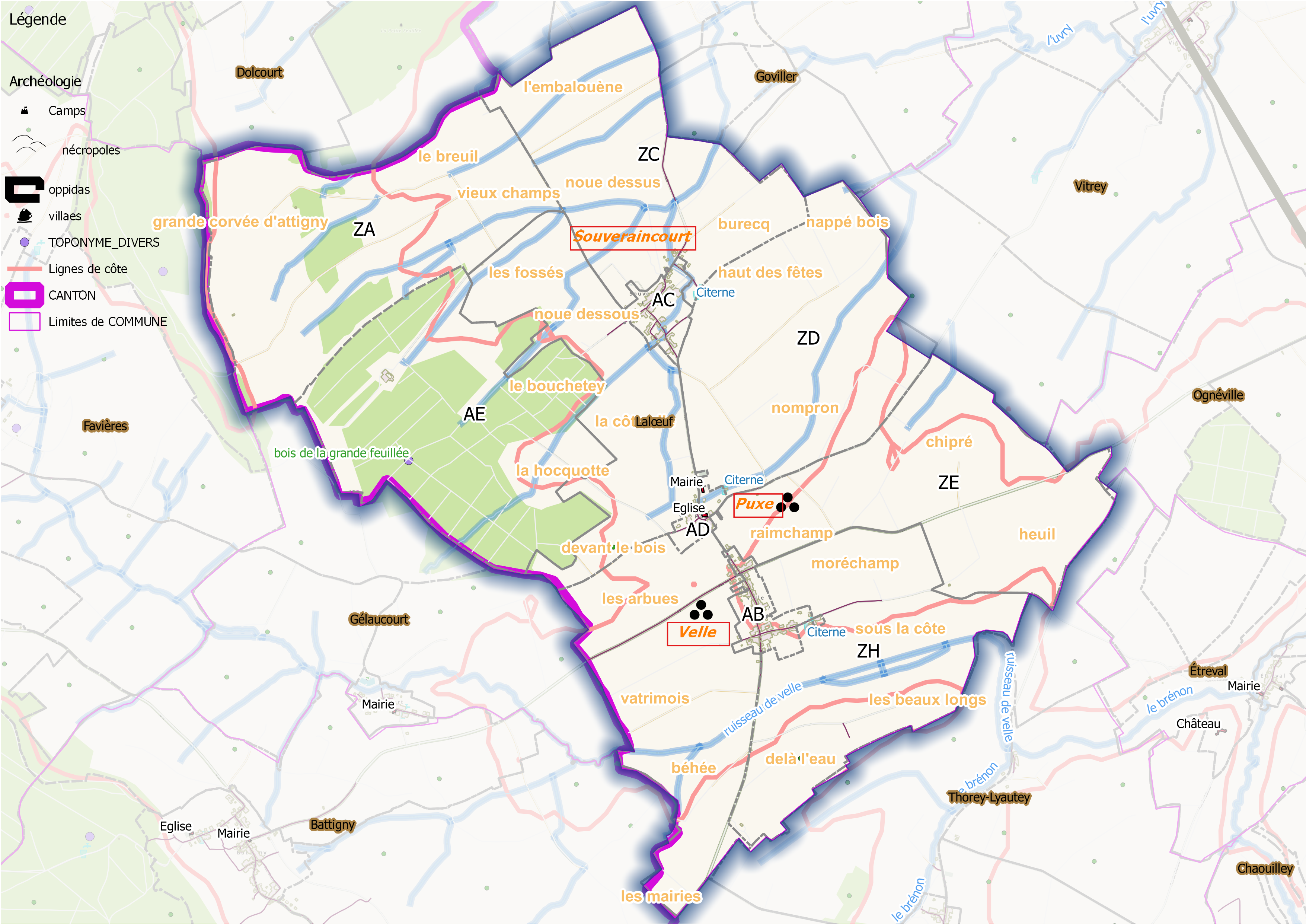 Laloeuf (ban communal) Osm et Qgis, mentions additionnelles